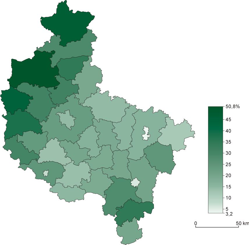 Kartogram ciągły – mapa lesistości w powiatach województwa wielkopolskiego w 2013 roku